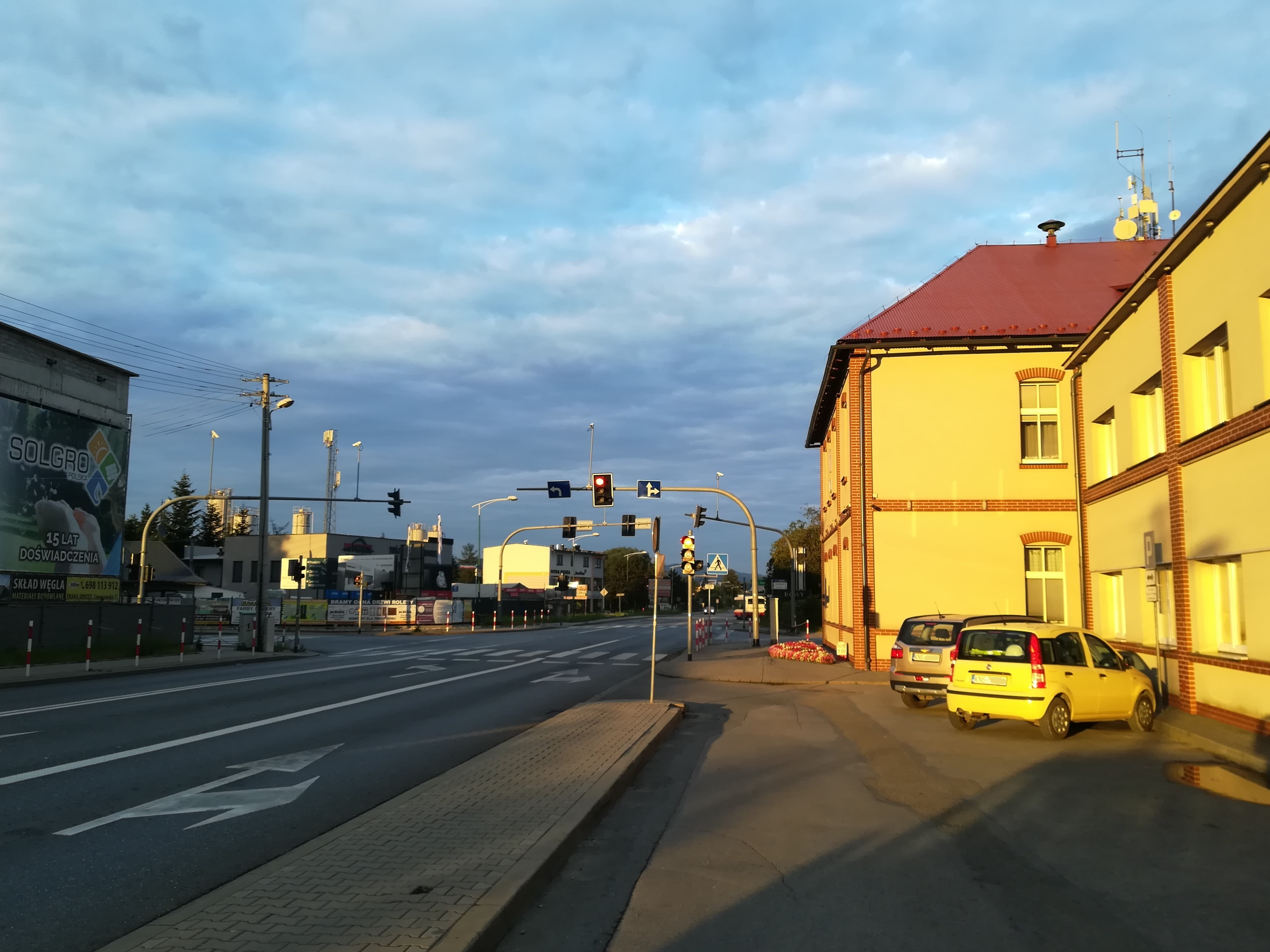 Urząd Gminy Chełmiec.